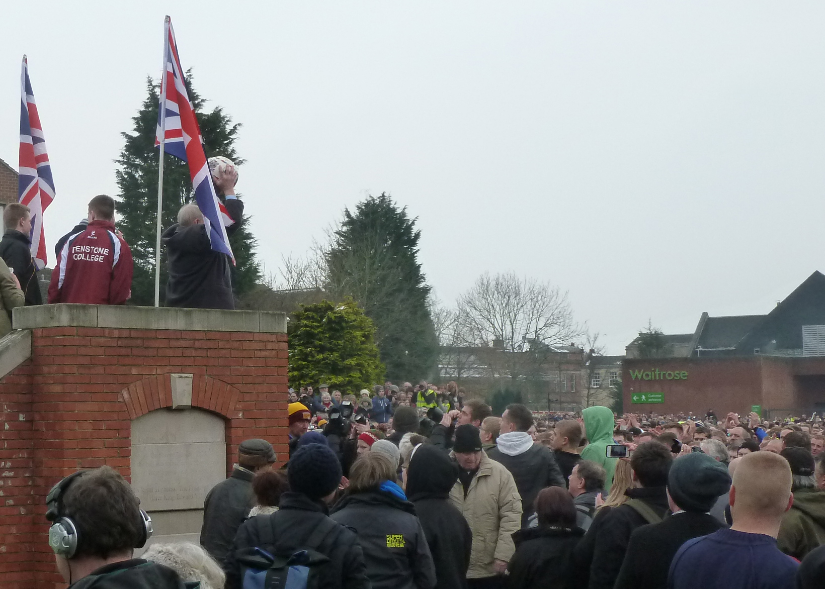 Anstoss des Shrovetide in Asbourne 2013